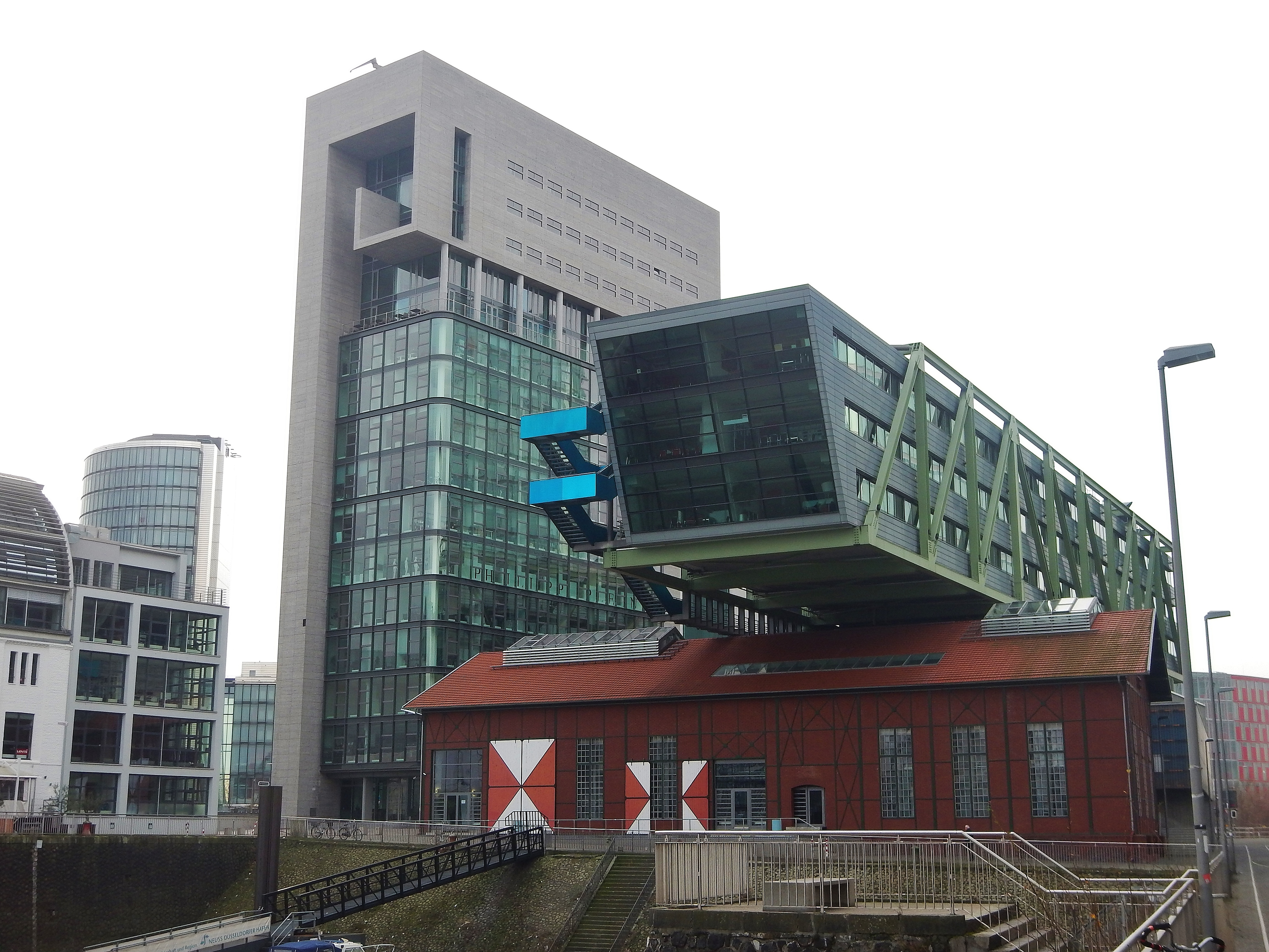 MedienHafen in Düsseldorf: Port Event Center PEC mit Baukörper Wolkenbügel